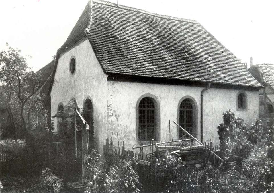 Synagoge (Michelbach an der Lücke) Nutzungsbedingungen ausdrücklich auch für Wikipedia (siehe: [1]